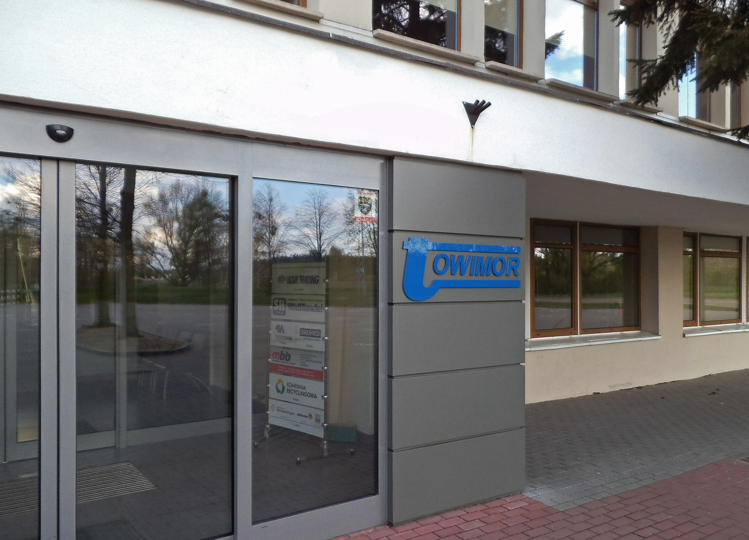 Towimor - Torun